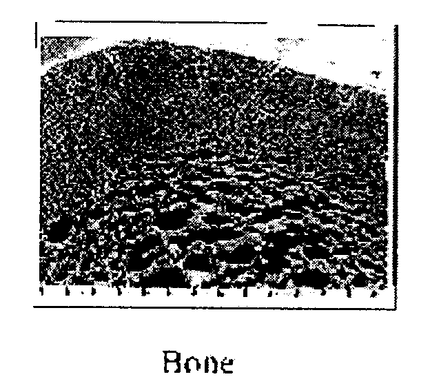 های ساخت بشر FGM